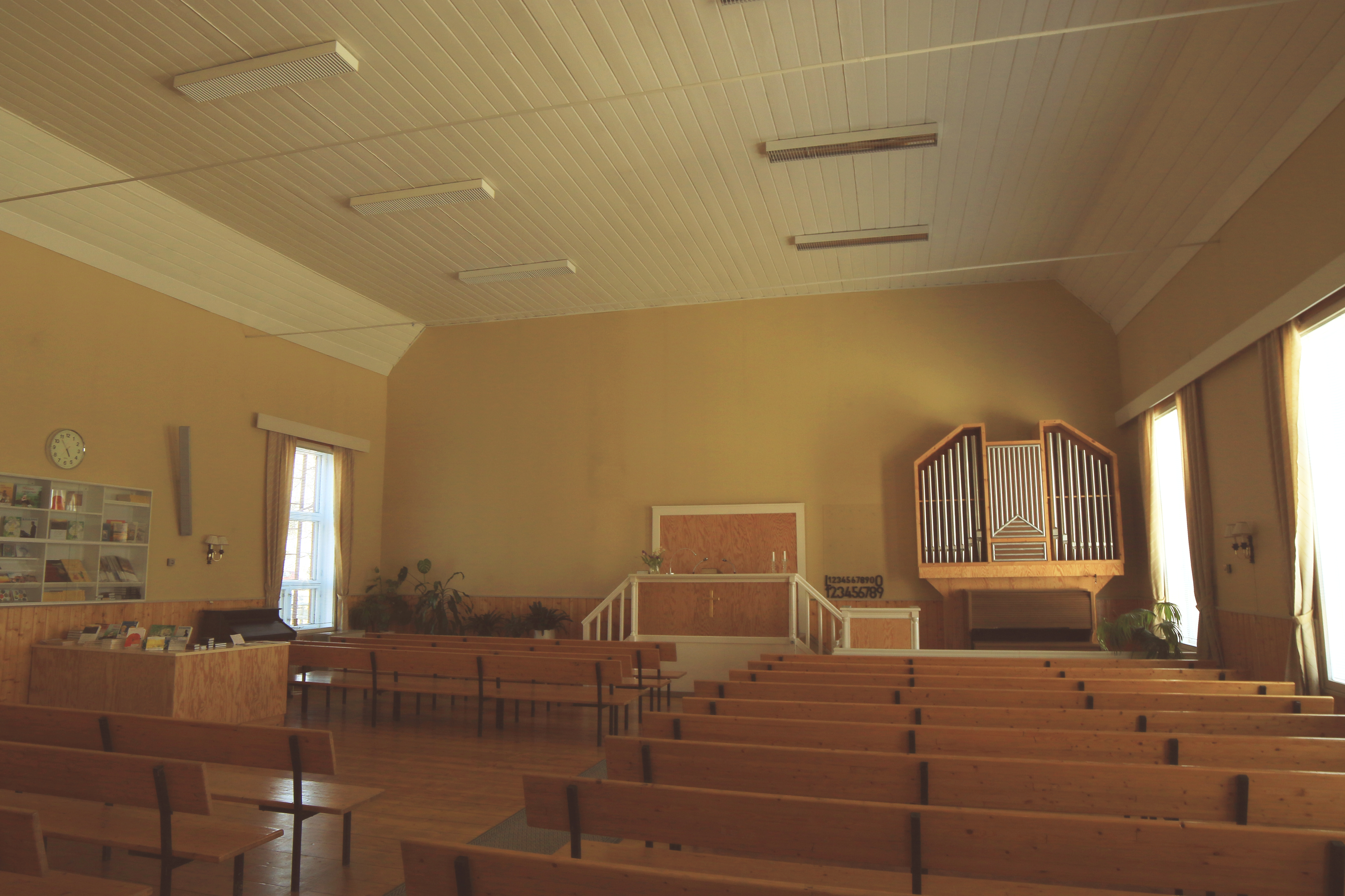 Kemin rauhanyhdistyksen talo on Suomen vanhin.